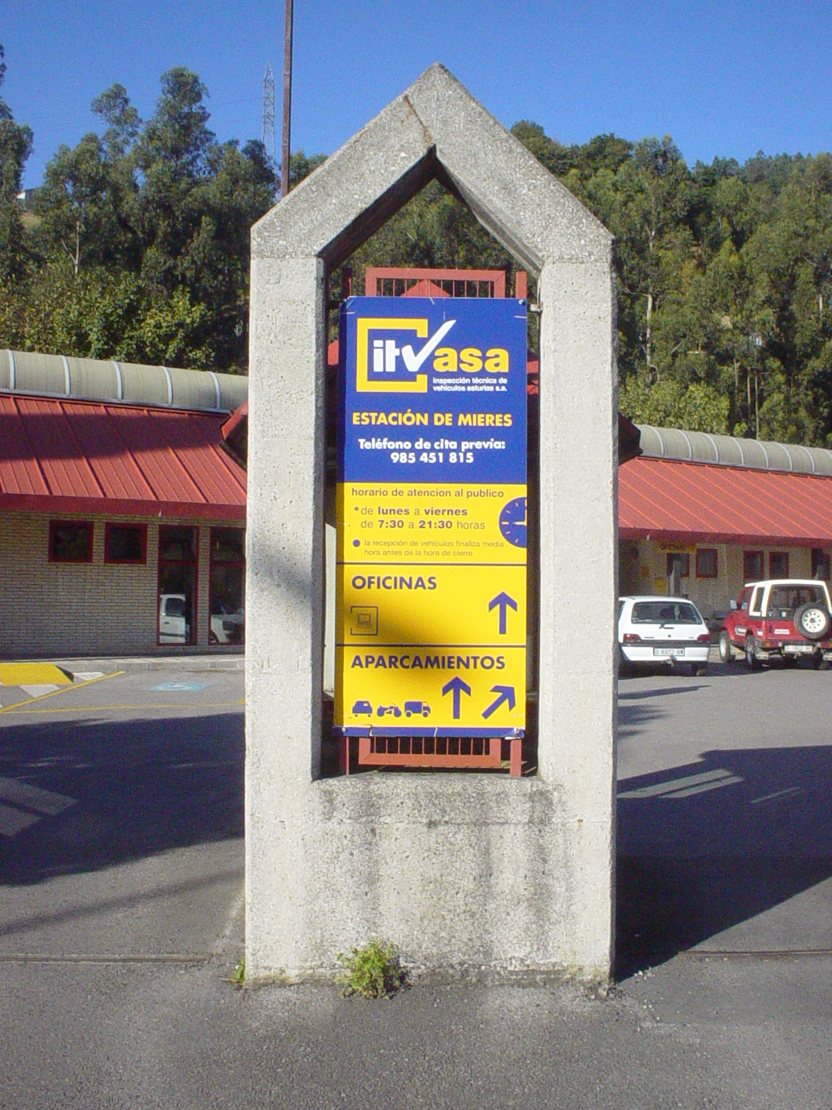 Delegación de ITVASA en Mieres